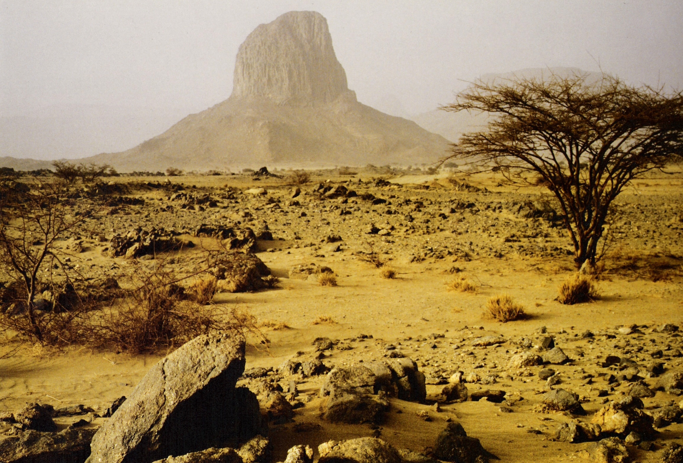 Iharen, Phonolit bei Tamanrasset, Algerien.